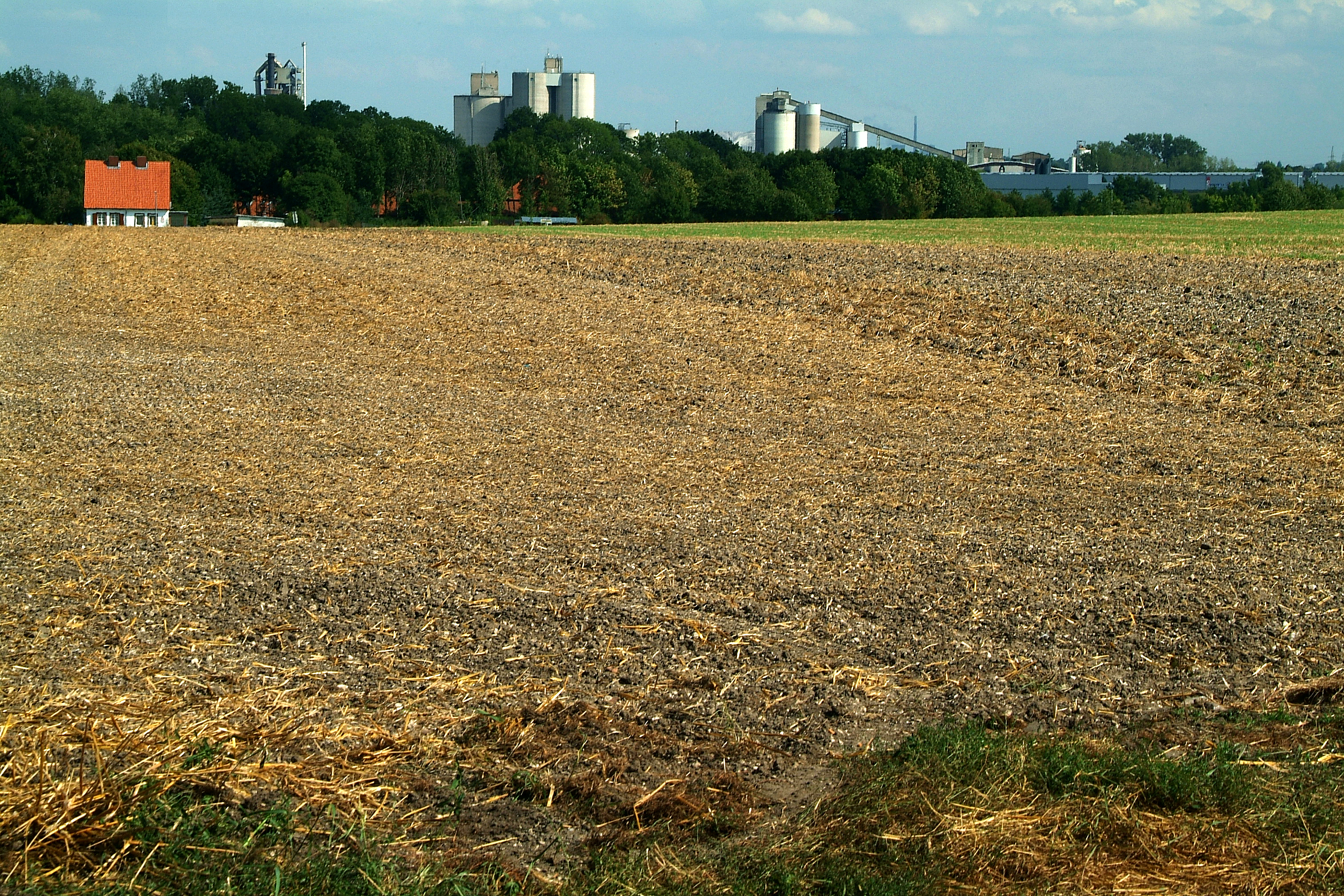 Blick von der Holländerwindmühle auf dem Kronsberg im hannoverschen Stadtteil Anderten zur Schleusensiedlung "Klein-Kleckersdorf" an der Hindenburgschleuse; im Hintergrund erheben sich die (heutigen) Holcim Zementwerke, das ehemalige Zementwerk Alemania in Sehnde ...